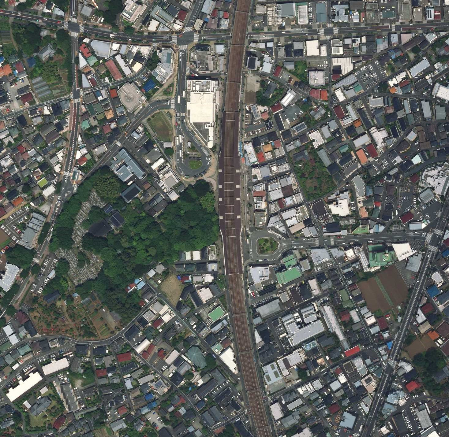 東京都狛江市、狛江駅周辺。国土地理院の空中写真 CKT20176-C51-3より一部切り取り。 2017/5/31撮影